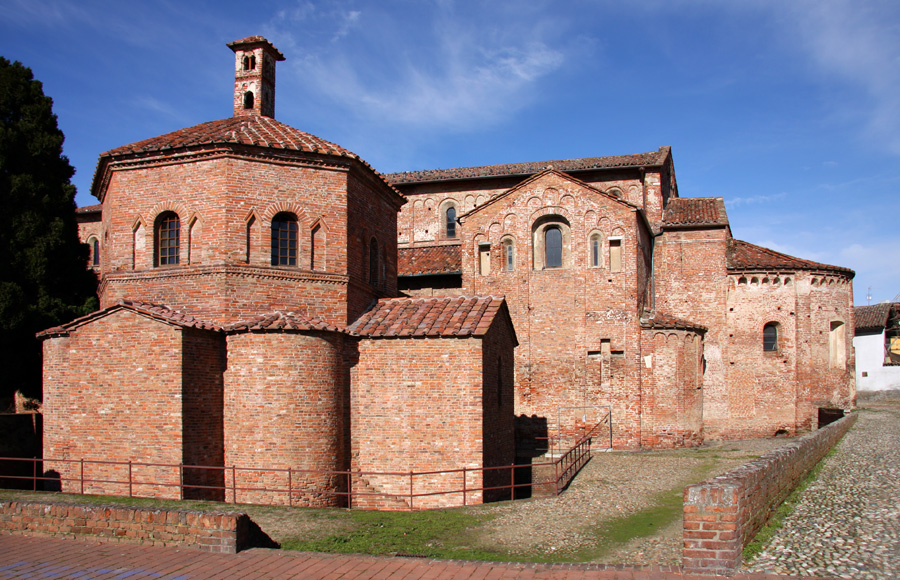 Il Battistero di San Giovanni ad Fontes, a lato della Basilica di Santa Maria Maggiore a Lomello (PV)